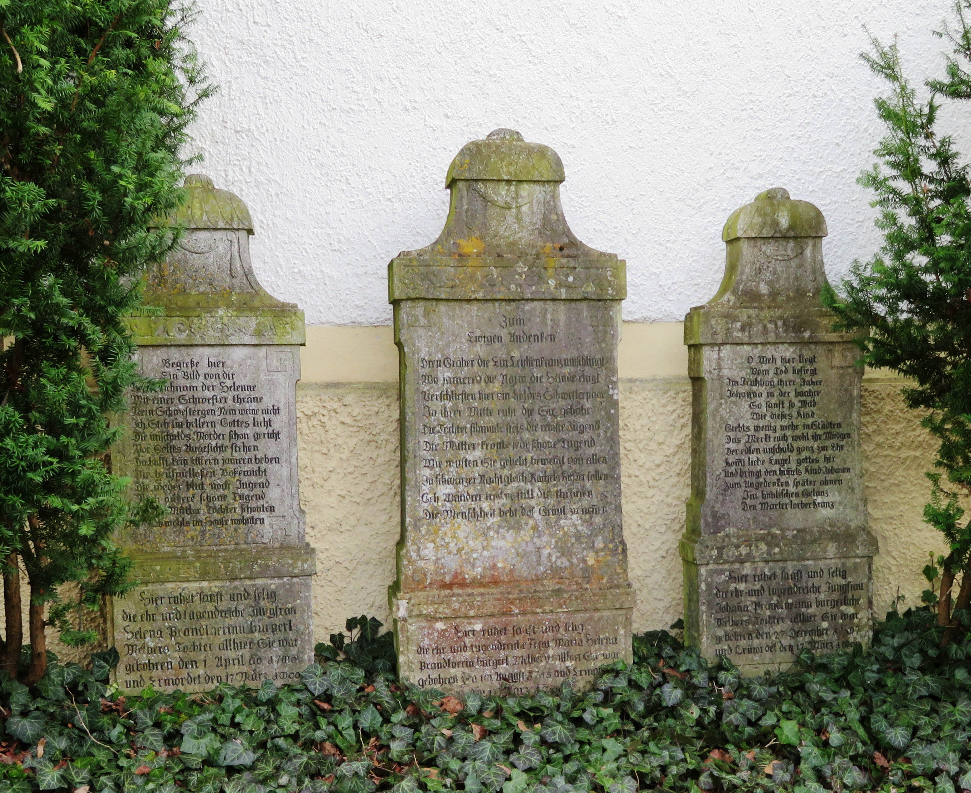 Westfriedhof Ingolstadt, eine kurze Schilderung des Mordes findet sich auf